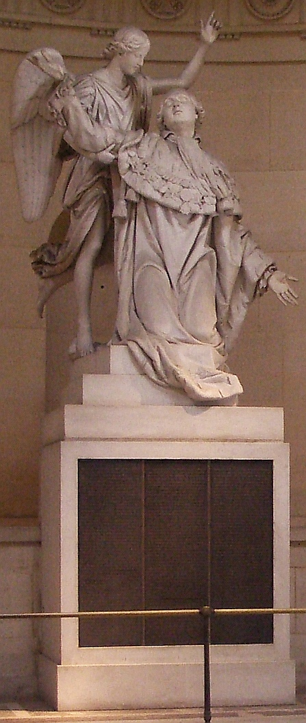 titre : Apothéose de Louis XVI ou Louis XVI appelé à l'immortalité soutenu par un ange (achevée vers 1826) Sculpteur : François-Joseph Bosio lieu : Chapelle Expiatoire description : D'abord conçu pour l'église de la Madeleine, en 1834 il fut installé à la chapelle expiatoire, lieu qu'il n'a jamais quité. Cette chapelle fut construite afin de rendre hommage au roi et à la reine mis à mort par le gouvernement républicain. Cette chapelle est toujours restée un lieu importante pour les royalistes français. Cette sculpture montre le Roi en position extatique. L'ange à sa droite le soutient et lui montre son destin, le ciel.